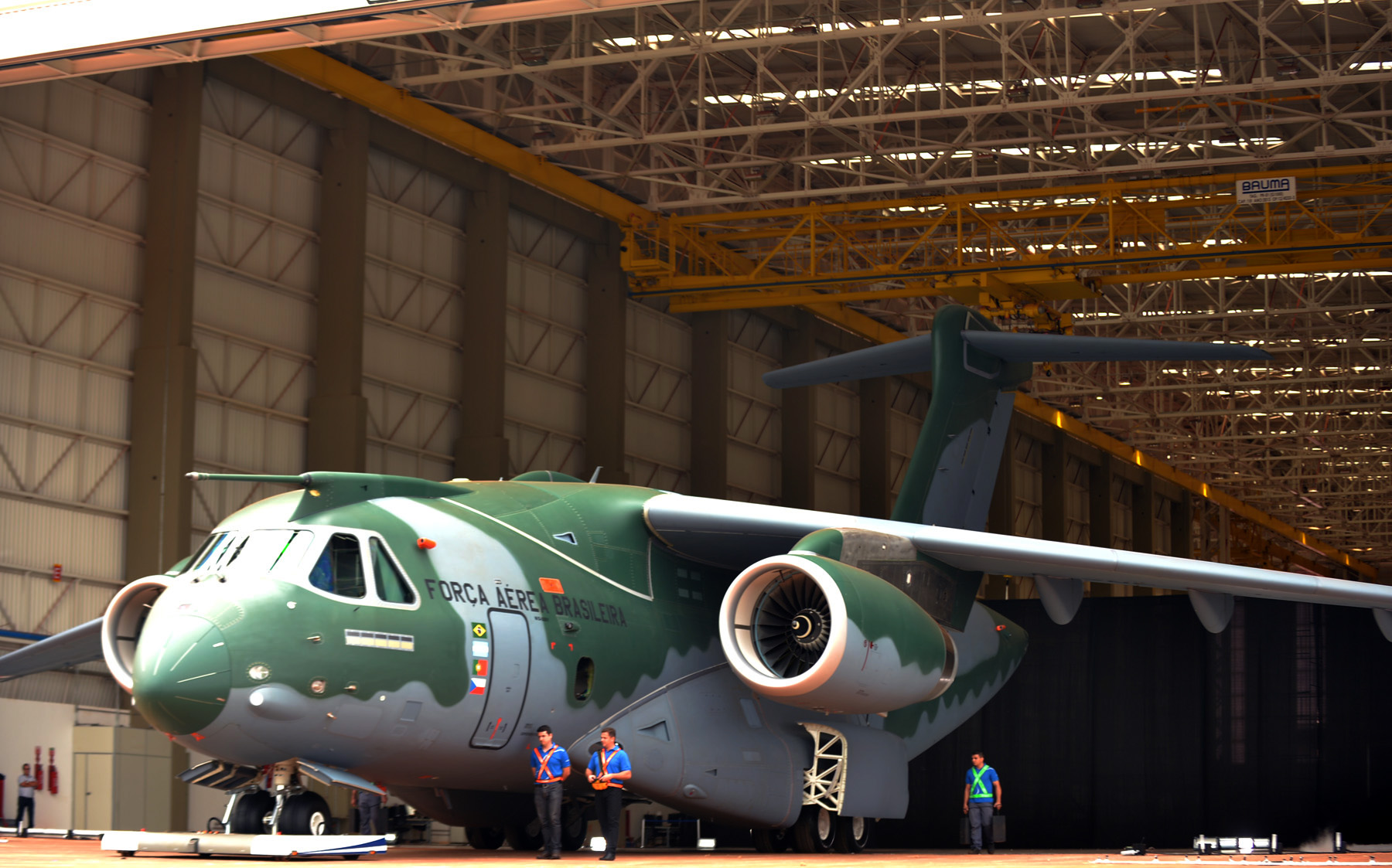 21/10/2014, Gavião Peixoto - SP Fotos: Tereza Sobreira